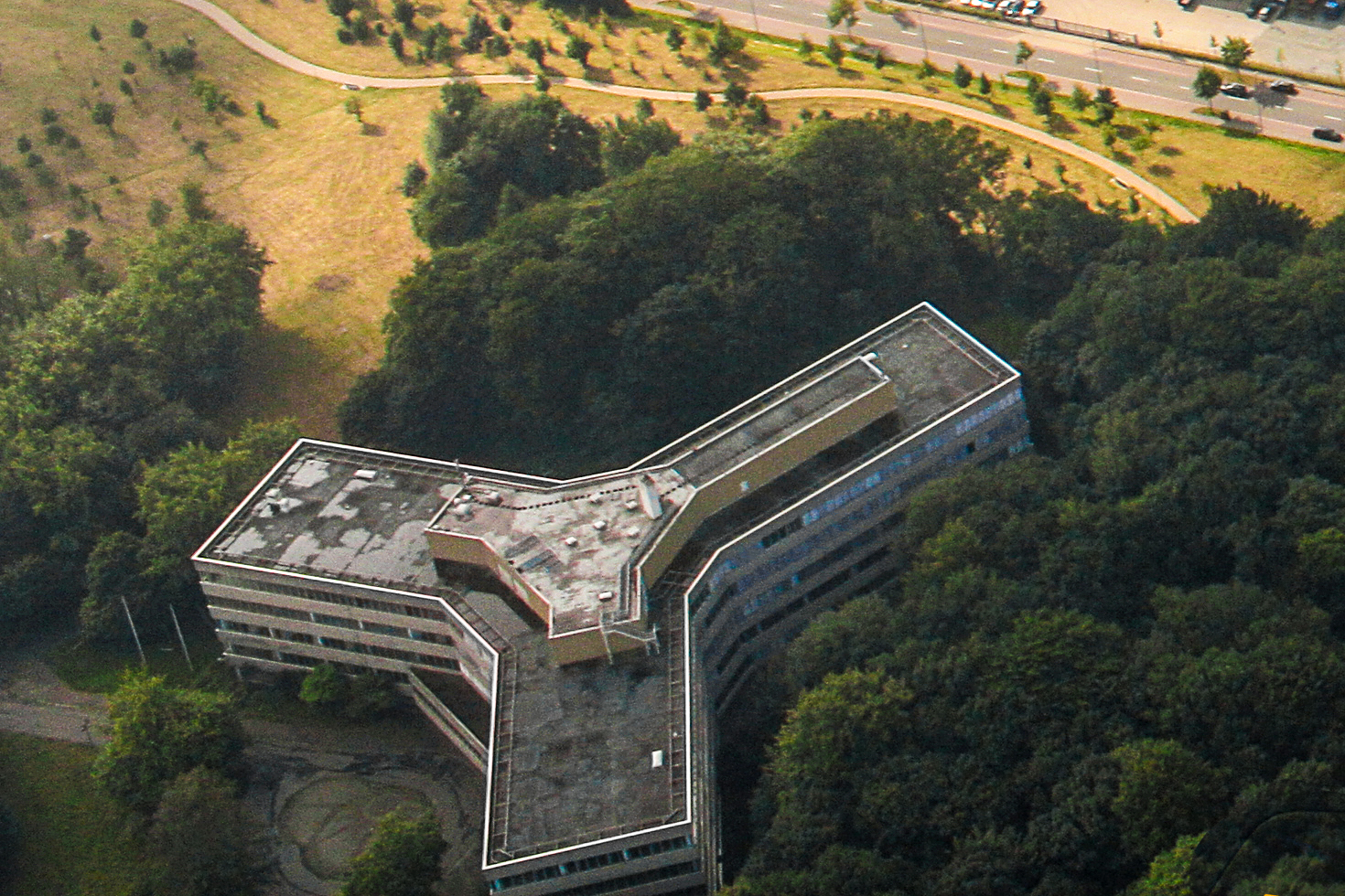 Ehemaliges Verwaltungsgebäude der früheren Großwerft Bremer Vulkan (1893–1997) in Bremen-Vegesack; seit November 2016 dient es als „Ankunftszentrum für Flüchtlinge“ im Land Bremen und ist seitdem Sitz von folgenden Institutionen: • Bremer Außenstelle des Bundesamts für Migration und Flüchtlinge (BAMF) • Erstaufnahmeeinrichtung (EAE) des Landes Bremen • Zentrale Aufnahmestelle (ZASt) des Landes Bremen • Gesundheitsamt (Außenstelle des Bremer Gesundheitsamtes) Hinweis: Die Luftaufnahme stammt aus folgender Serie vom 8. August 2012: Fotoflug Bremen; Flughöhe 500 m; von der Autobahnabfahrt der A 27 in Bremen-Nord über Vegesack zum U-Boot-Bunker Valentin.